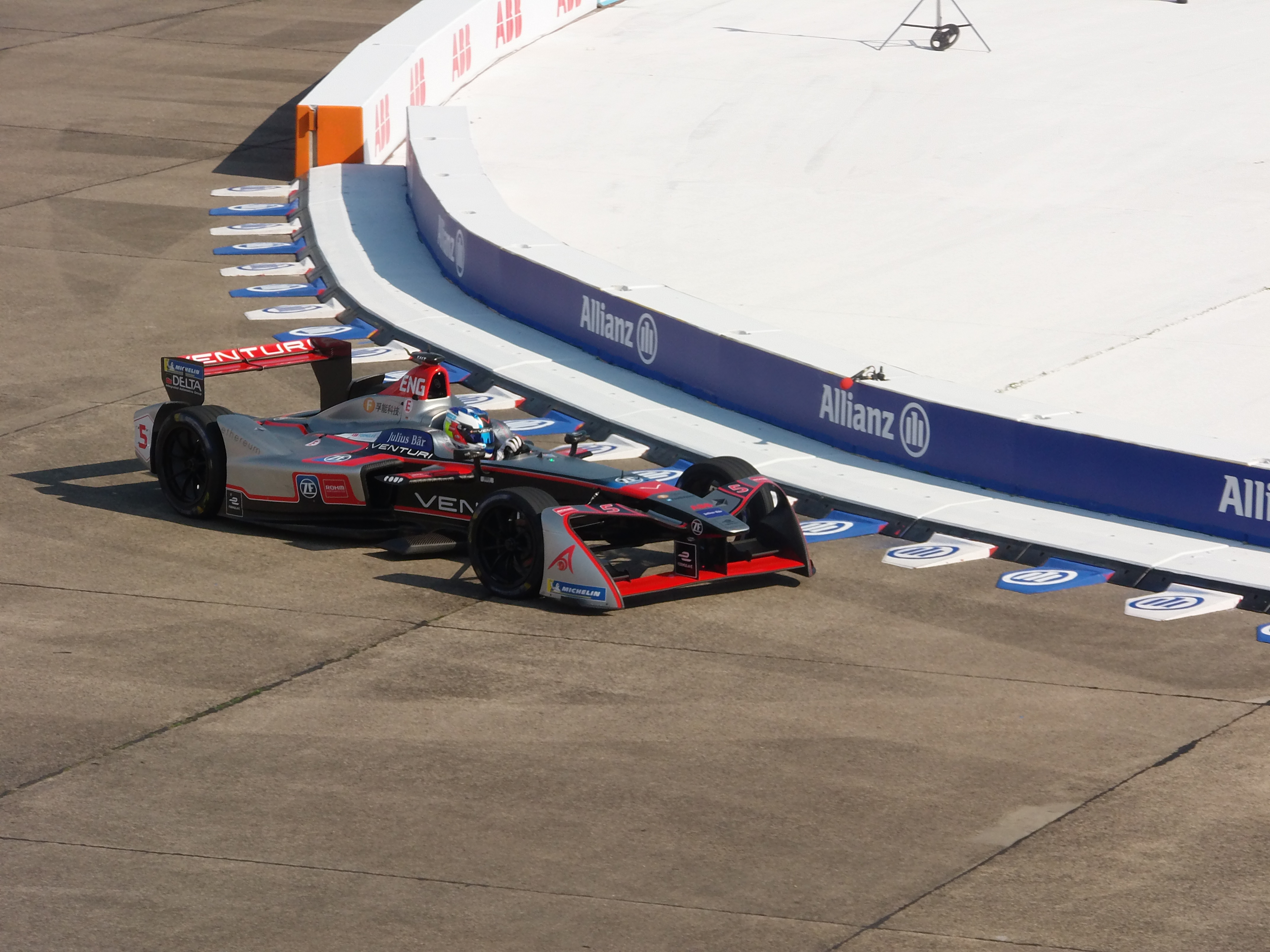 Maro Engel im Venturi VM200-FE-03 beim Berlin E-Prix 2018